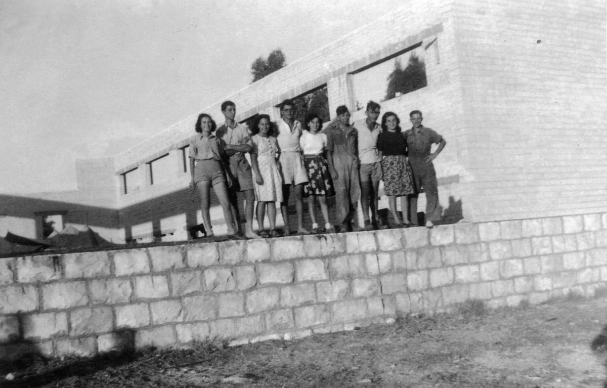 פלוגה ה הדרומית - בגבעת חיים- גרעין ג' של מכבי צעיר 1946- 7.1945 - בבניין הפועל